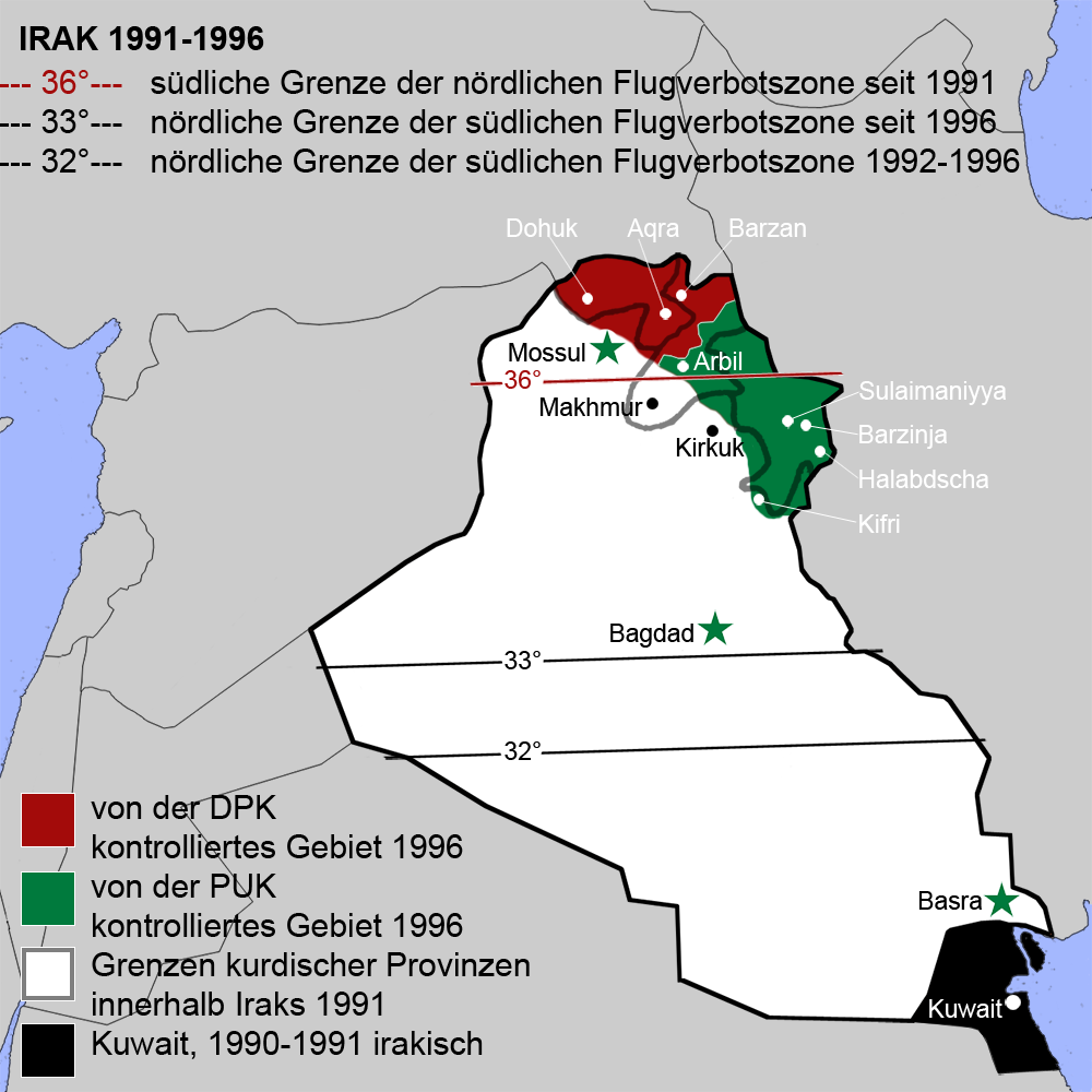 Situation im Irak bzw. in den nordirakischen Kurdengebieten von 1991 bis 1996 ROT: von Kurden-Rebellen der Demokratischen Partei Kurdistans (DPK, Barzani) kontrolliertes Gebiet der Kurdischen Autonomen Region vom Aufstand 1991 bis zum Vorabend des irakischen Eingreifens 1996 - nach Fischer Weltalmanach '97, Seite 305f. (Fischer, Frankfurt/Main 1996) GRÜN: von Kurden-Rebellen der Patriotischen Union Kurdistans (PUK, Talabani) kontrolliertes Gebiet der Kurdischen Autonomen Region vom Aufstand 1991 bis zum Vorabend des irakischen Eingreifens 1996 - nach Fischer Weltalmanach '97, Seite 305f. (Fischer, Frankfurt/Main 1996) WEISS: (übriger) Irak mit Grenzen der drei Gouvernements der Kurdischen Autonomen Region (Dohuk, Arbil, Sulaimaniyya) - nach Fischer Weltalmanach '97, Seite 305f. (Fischer, Frankfurt/Main 1996), Kleines Nachschlagewerk Asien, Seite 220 (Dietz Verlag, Berlin 1987) und Haack Handkarte Asien, Seite 2 (Haack, Gotha 1989) Grenzen der Flugverbotszonen (seit 1991 nördlich des 36. Breitengrades zum Schutz der Kurden und seit 1992 südlich des 32. Breitengrades zum Schutz der Schiiten), erweitert nach dem irakischen Eingreifen in Kurdistan (seit 1996 südlich des 33. Breitengrades) - nach Fischer Weltalmanach '97, Seite 305f. (Fischer, Frankfurt/Main 1996) SCHWARZ: Kuwait, von 1990 bis 1991 irakisch